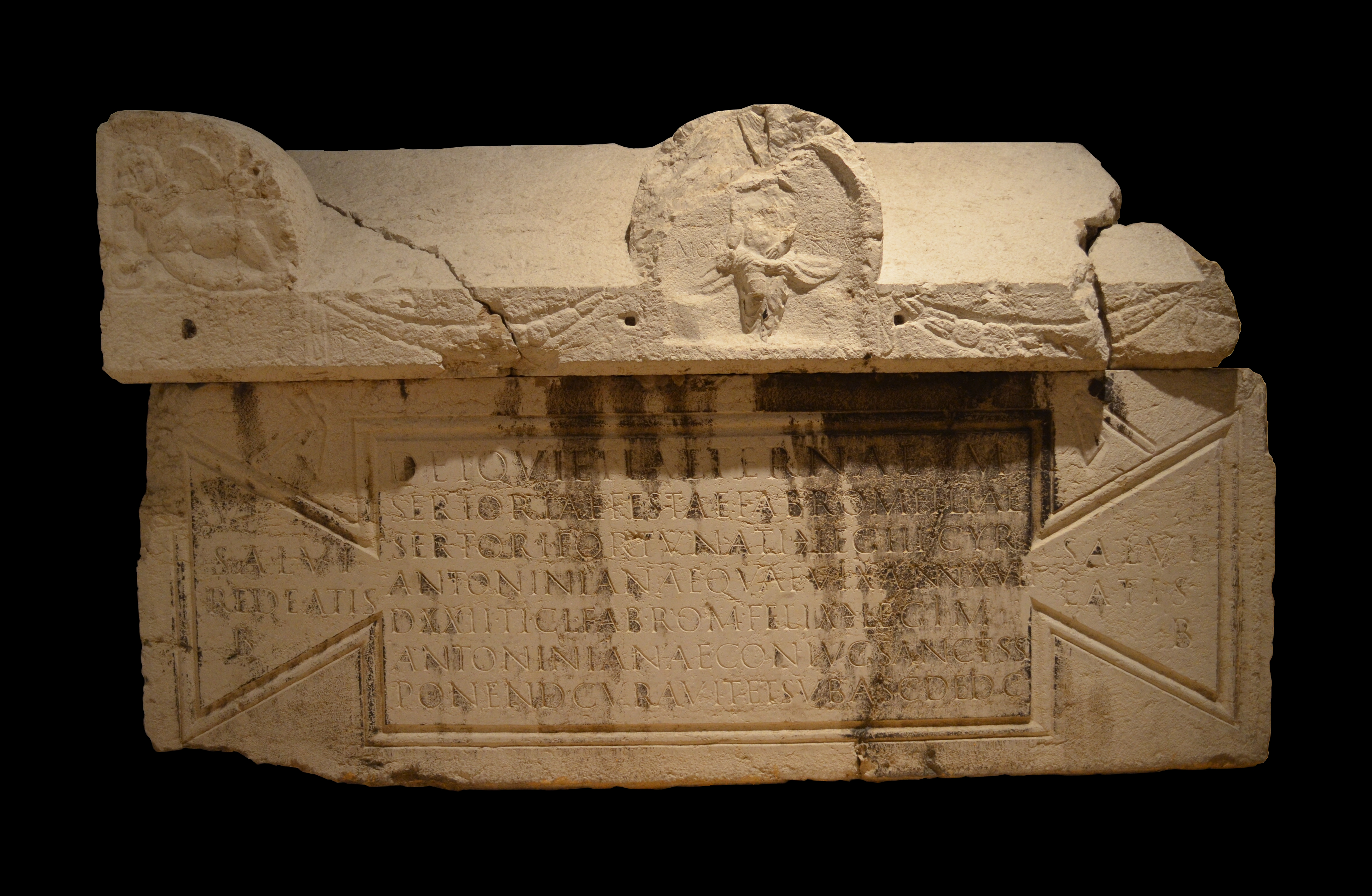 Musée gallo-romain de Fourvière (Lyon) - Sarcophage découvert à Lyon en 1882, lors de travaux de terrassement pour l'élargissement du côté droit de la rue de Trio, sur la propriété du Dr Brévard, contiguë à la gare. Haut. 85 cm ; long 240 cm. Couvercle : haut. 55 cm. D(iis) M(anibus) / et quieti aeternae / Sertoriae Festae Fab(ia) Rom(a) filiae / Sertori Fortunati c?(enturionis) leg(ionis) III Cyr(enaicae) / Antoninianae quae vix(it) ann(os) XVII / d(ies) XXII Ti(berius) Cl(audius) Fab(ia) Rom(a) Felix c?(enturio) leg(ionis) I M(inerviae) / Antoninianae coniug(i) sanctissim(ae) / ponend(um) curavit et sub asci(a) dedic(avit) // Salvi eatis / salvi redeatis / b(onis) b(ene) Aux dieux Mânes et au repos éternel de Sertoria Festa, de la tribu Fabia, native de Rome, fille de Sertorius Fortunatus, centurion de la légion III Cyrenaica Antoniniana ; morte à l'âge de dix-sept ans et vingt-deux jours ; Tiberius Claudius Felix, de la tribu Fabia, natif de Rome, centurion de la légion I Minervia Antoniniana, à son épouse très vertueuse, a élevé ce tombeau et l'a dédié sous l'ascia. CIL XIII 1893 = Lyon 00246 = CAG-69-02, p 618 et p. 173 (photo)